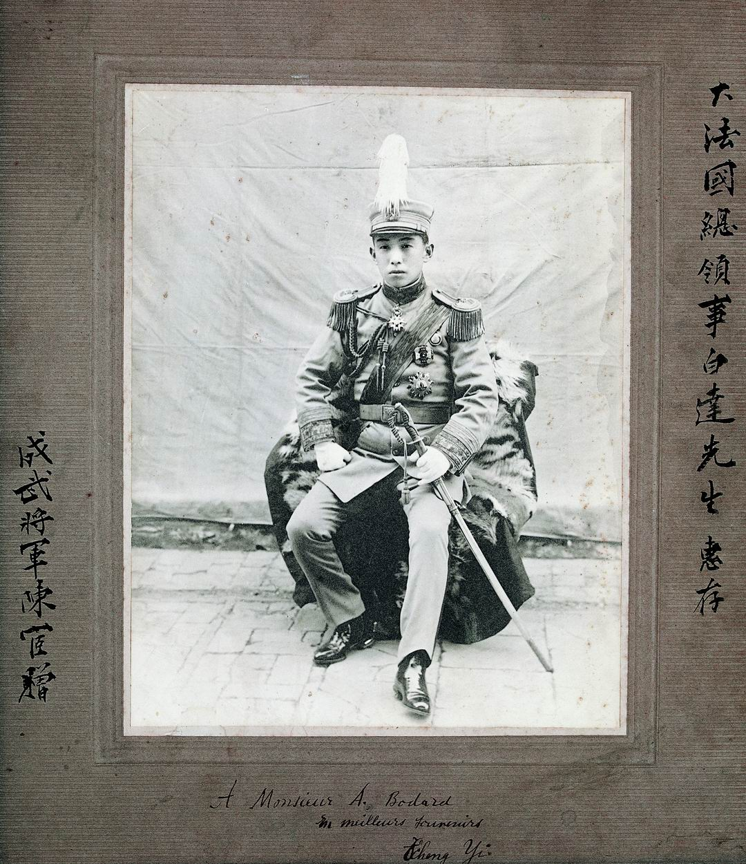 陈宧（汉语拼音：Chén Yí，1870年－1939年）